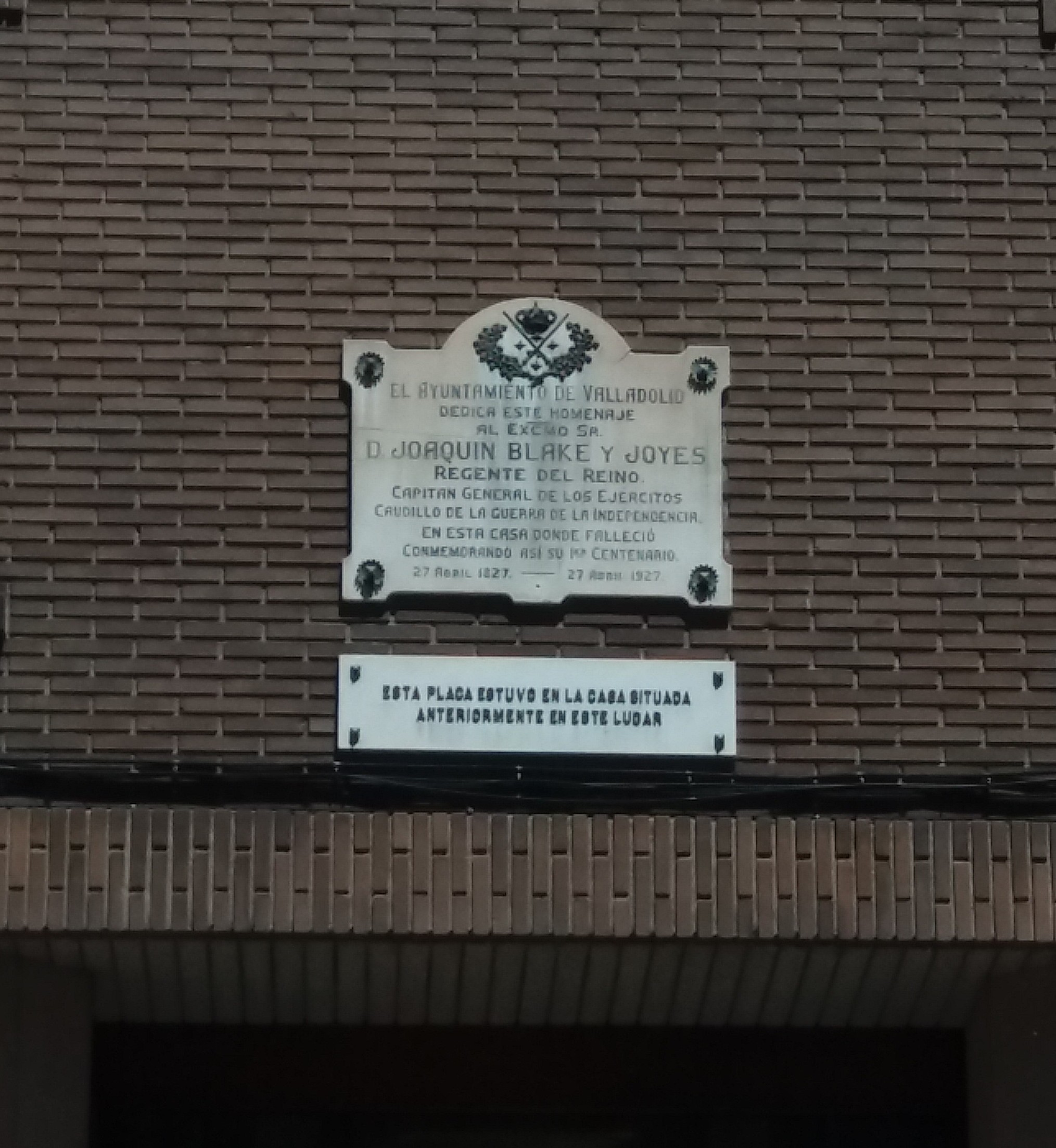 Placa instalada en la casa donde murió Joaquin Blake y Joyes en Valladolid (España)